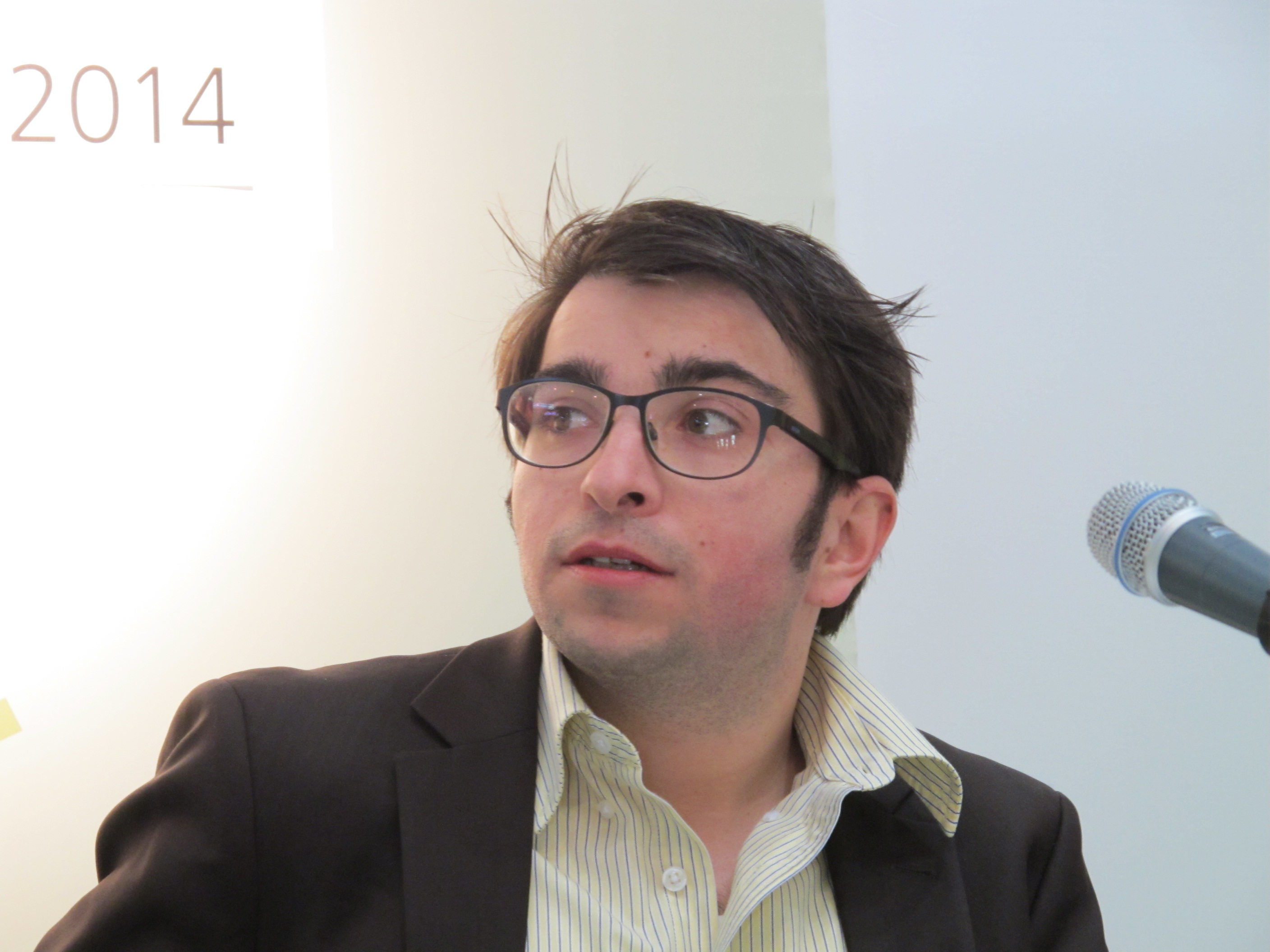 Leipziger Buchmesse 2014, Paul Henri Campbell